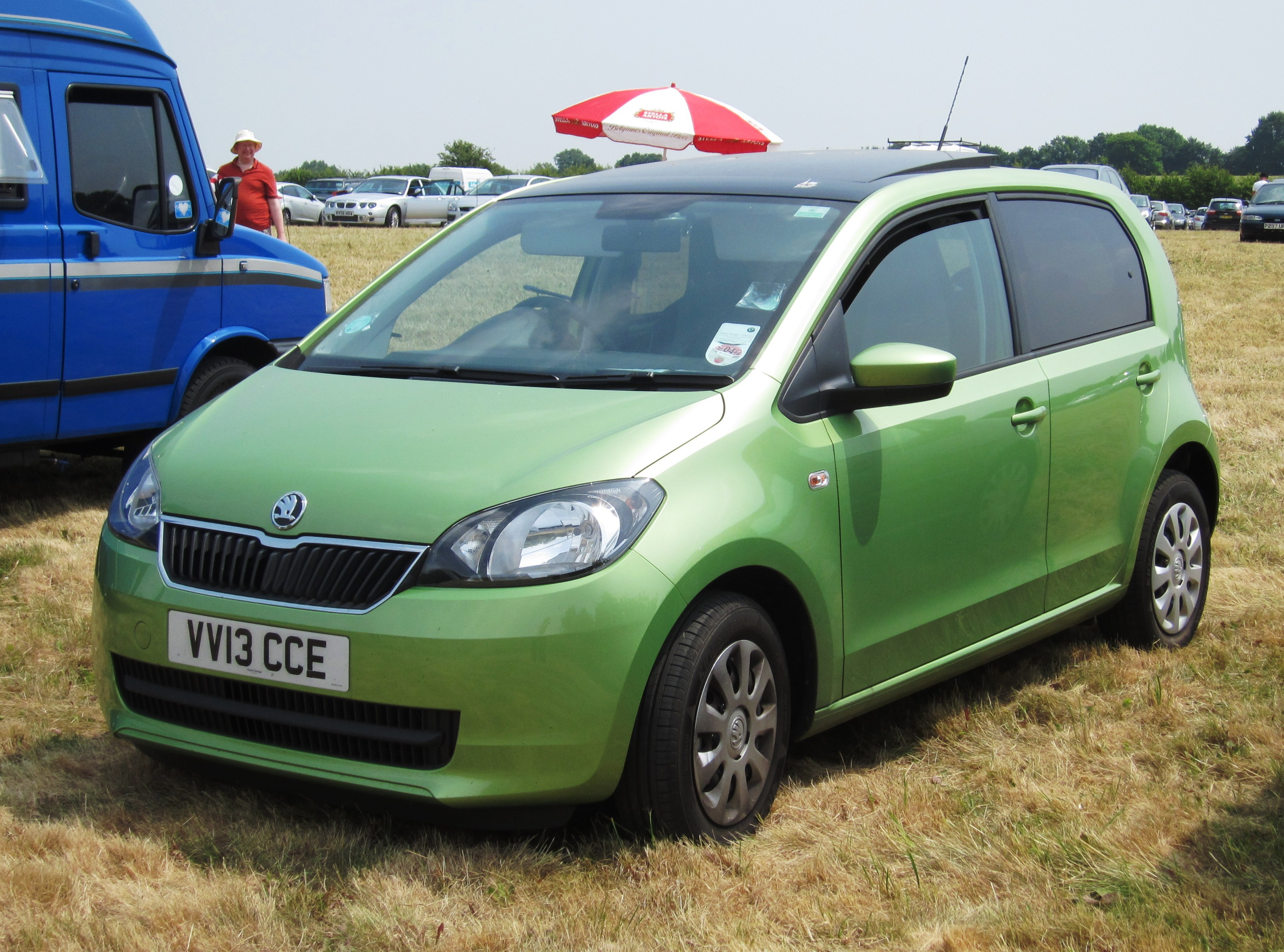 Škoda Citigo (2013)